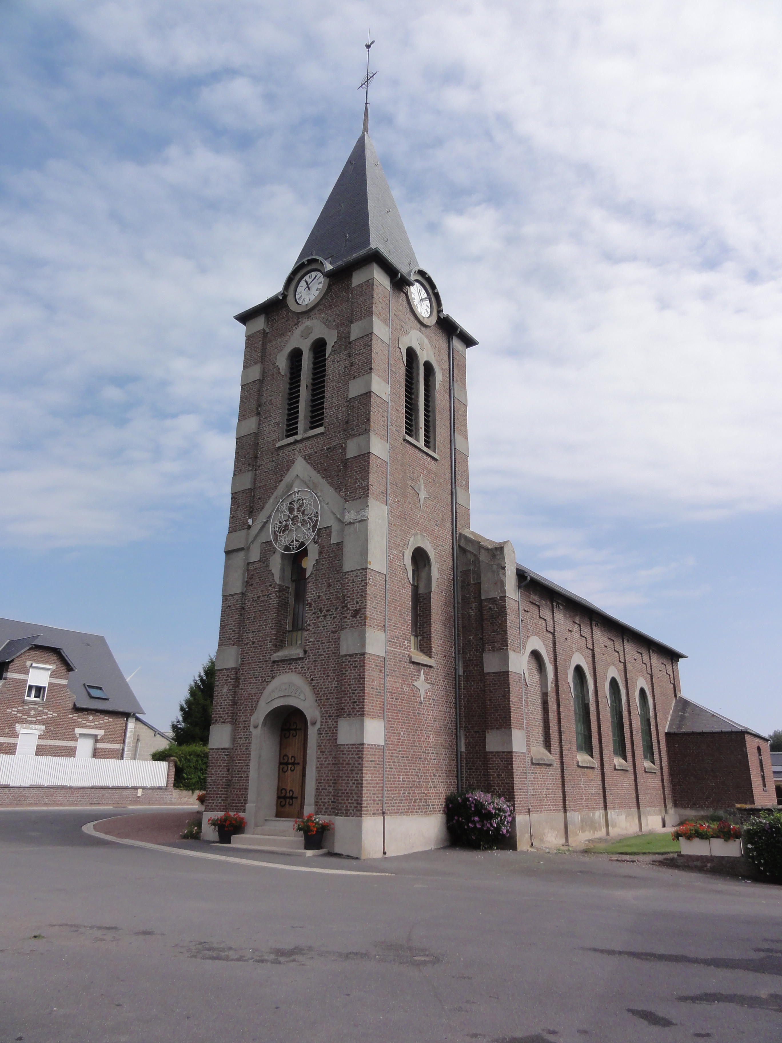 Hauteville (Aisne) église